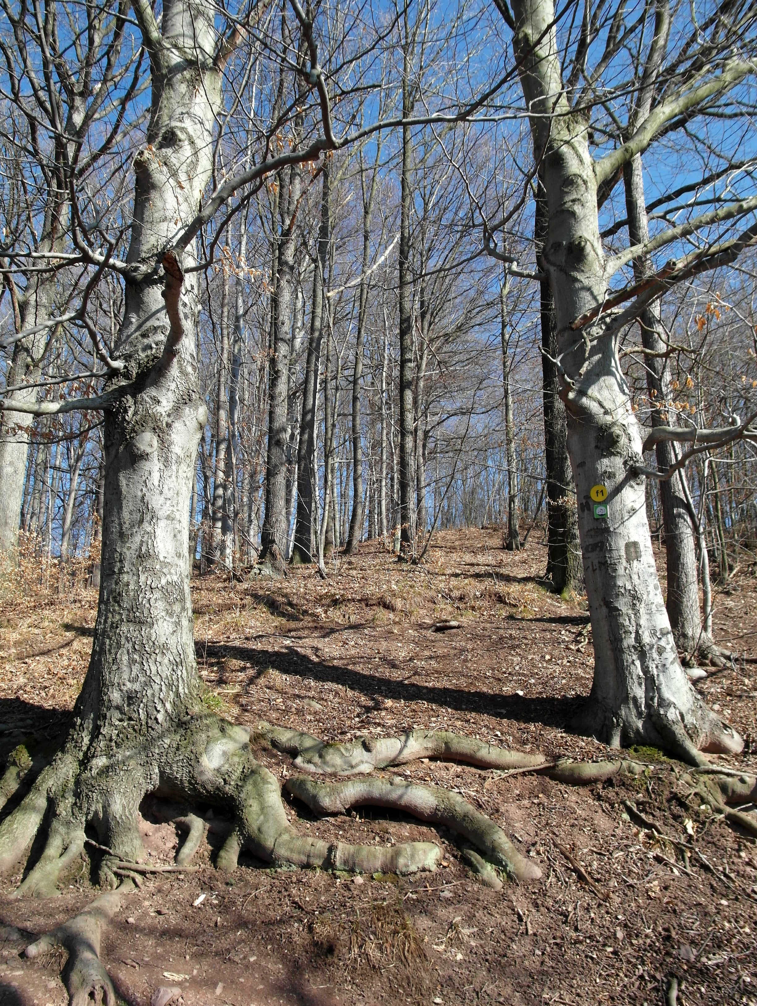 26.02.2015 01731 Lungkwitz (Kreischa): Im Eichberg Schloßpark (im Umfeld von GMP: 50.928800,13.770700). Am Baum rechts ein gelbes "f1", darunter ein Notenschild. Es verweist auf Wege, die Robert Schumann mit seiner Frau Clara (Pianistin und Komponistin Clara Josephine Schumann) gerne lief. [SAM8356.JPG]20150226045DR.JPG(c)Blobelt